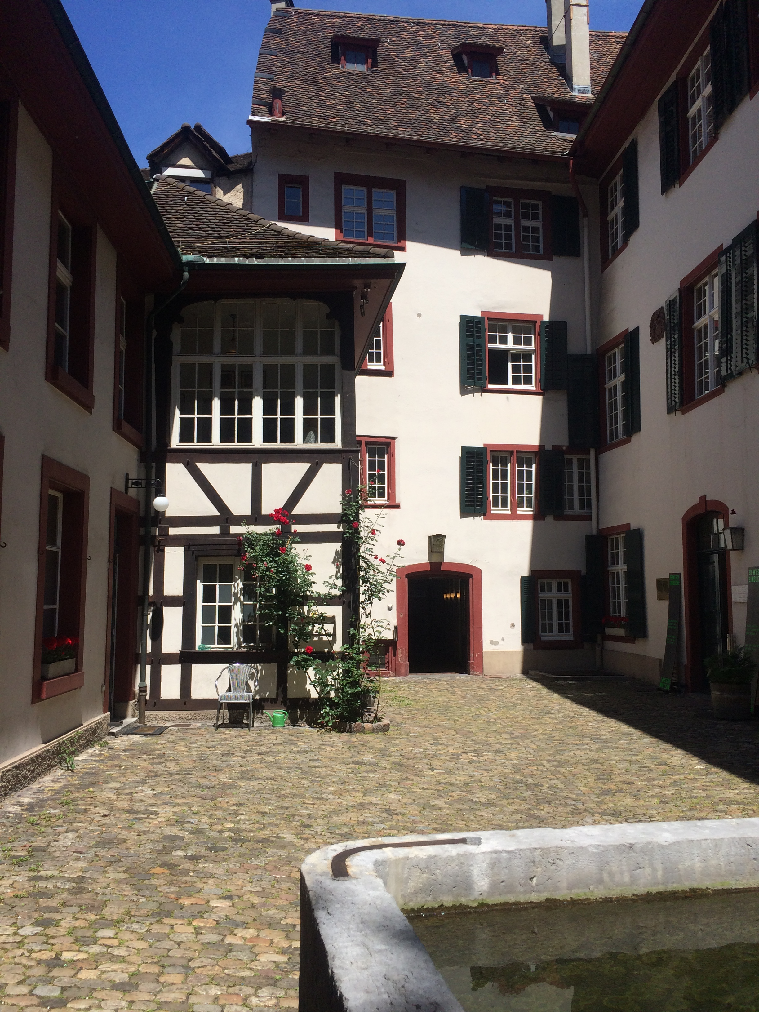 Innenhof des Museums; rechts das Haus "Zum Sessel"